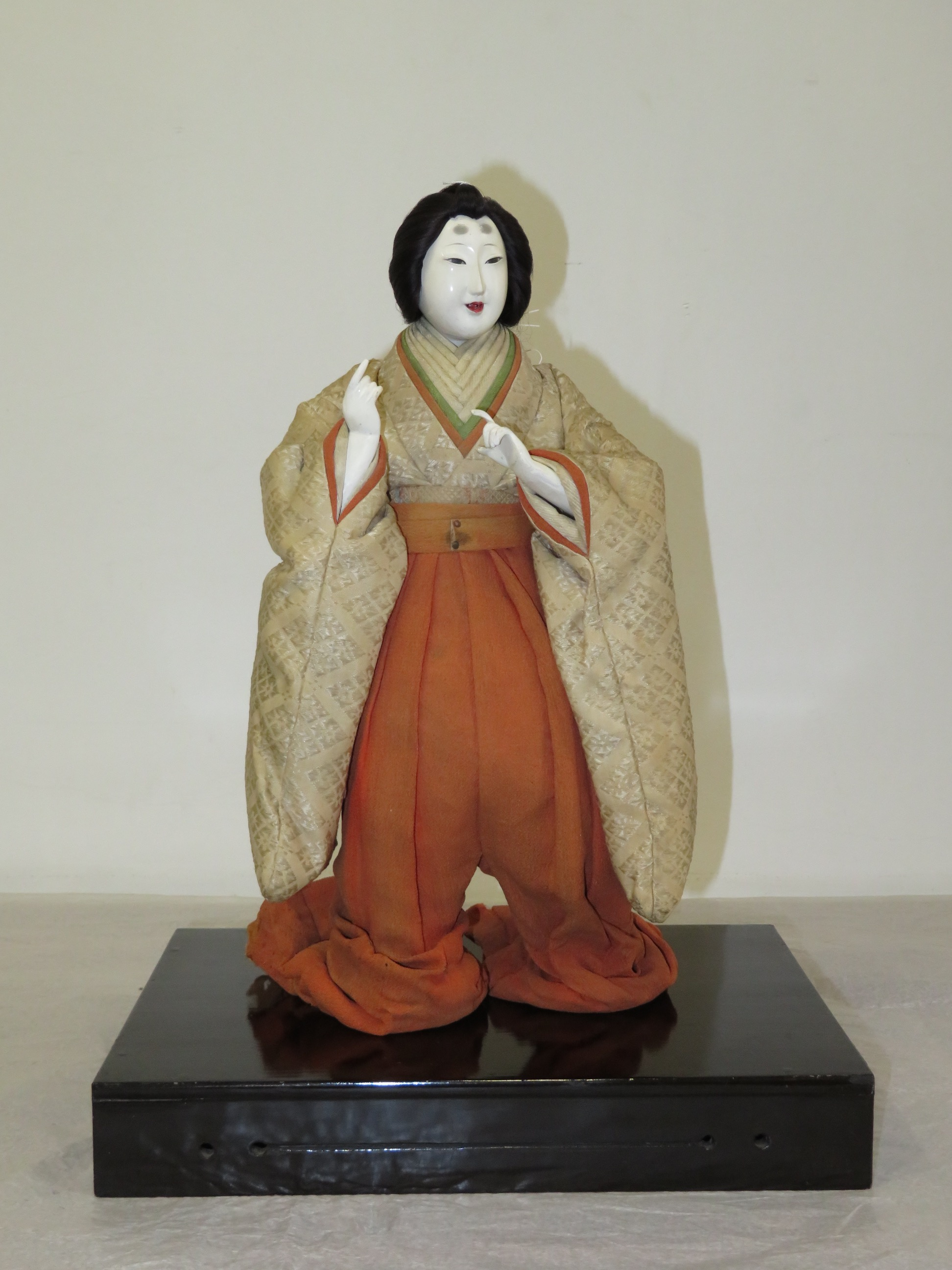 2018年2月27日-3月18日 東京国立博物館展示風景